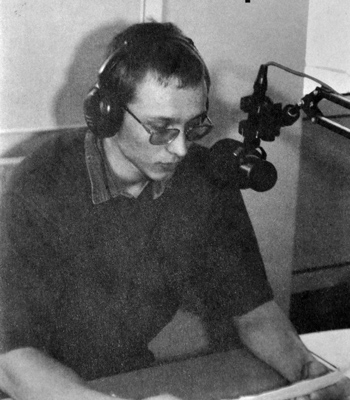 Merlis Nõgene